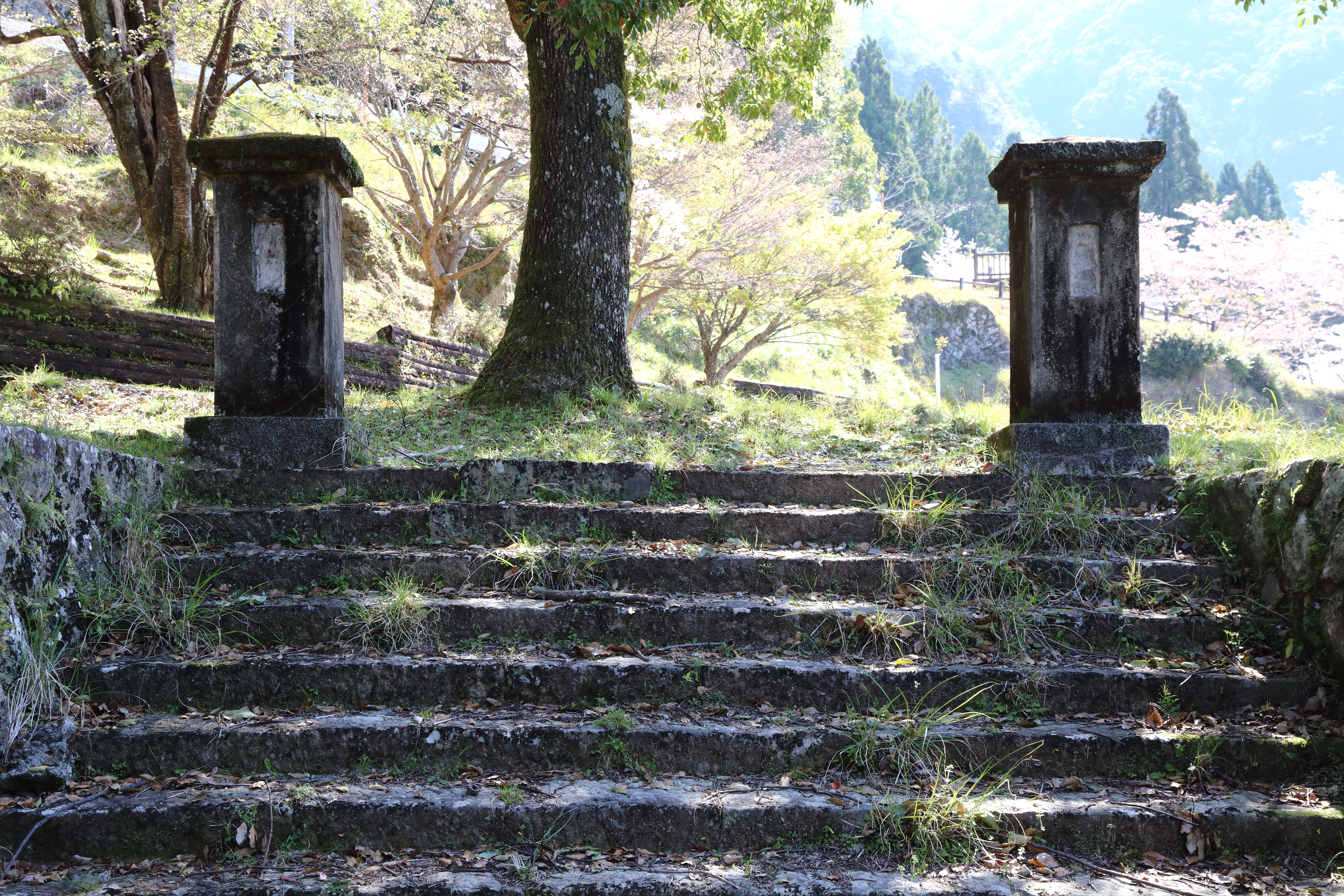 明倫小学校（夕陽の丘公園） 校門跡 三重県熊野市紀和町湯ノ口